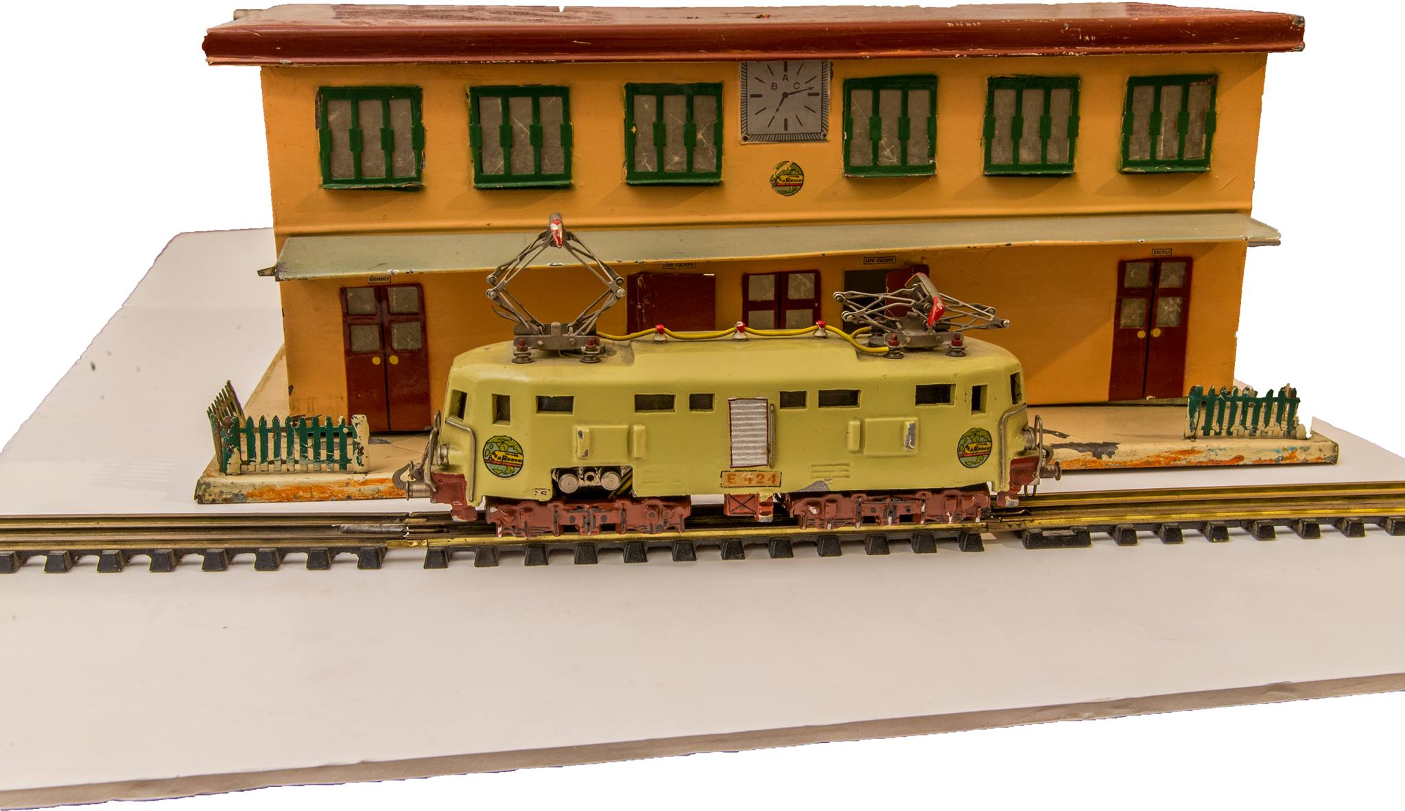 E 424 Conti Co.Mo.Ge seconda versione anno circa 1948.